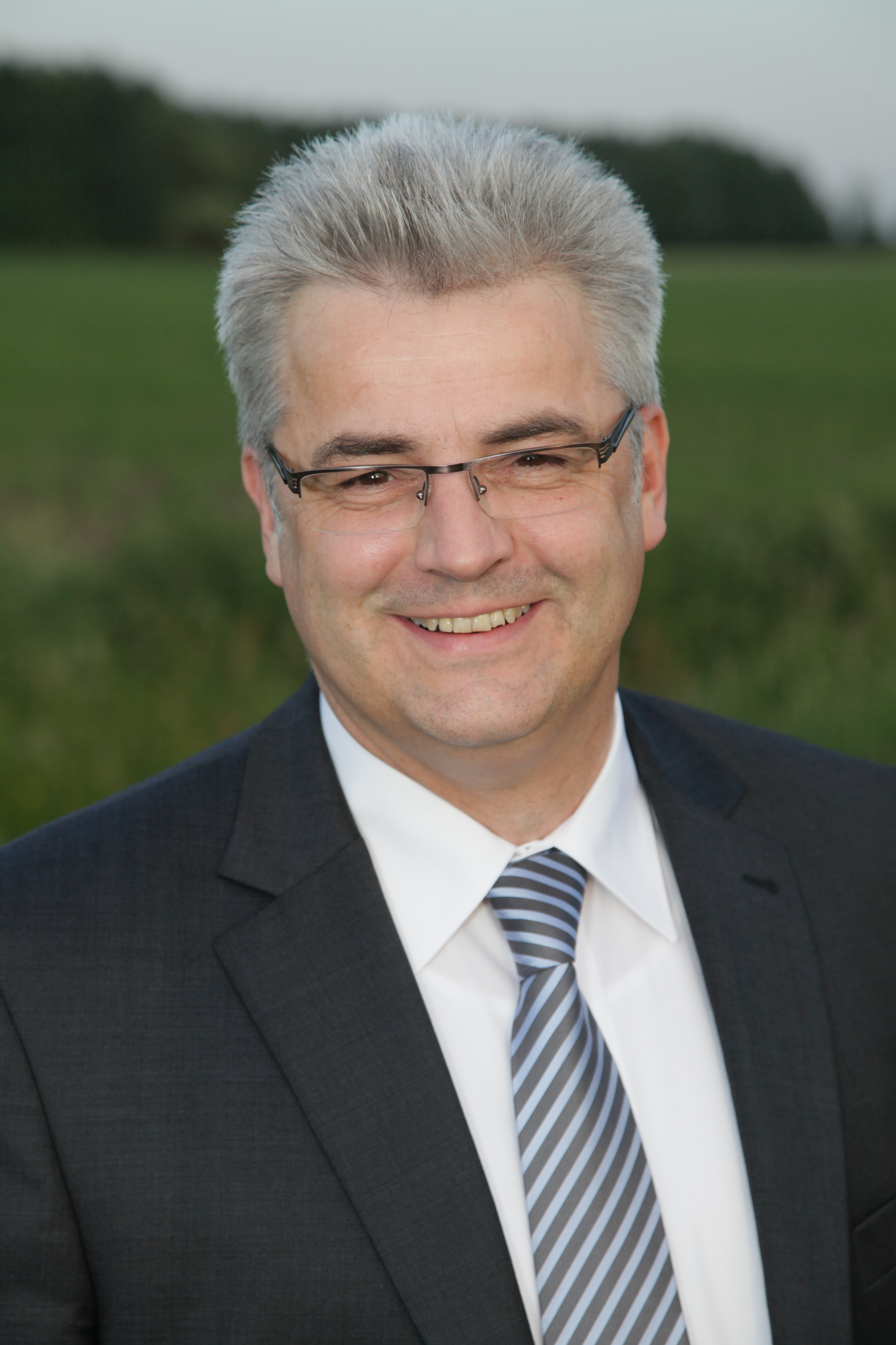 Axel Knoerig (2013)